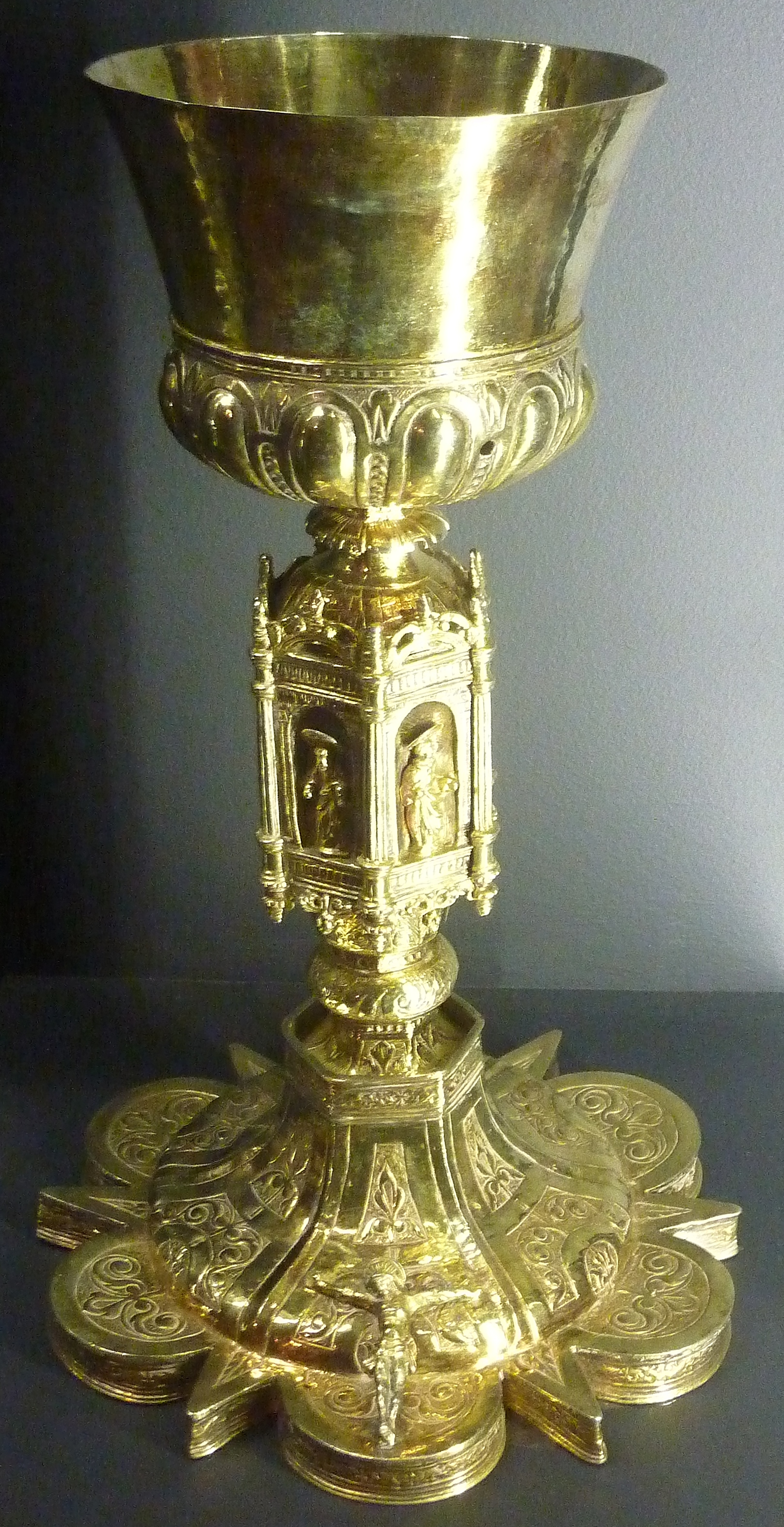 Loperhet : calice daté des environs de 1570 ou 1580 en argent doré, de style Renaissance. Classé monument historique en 1955.